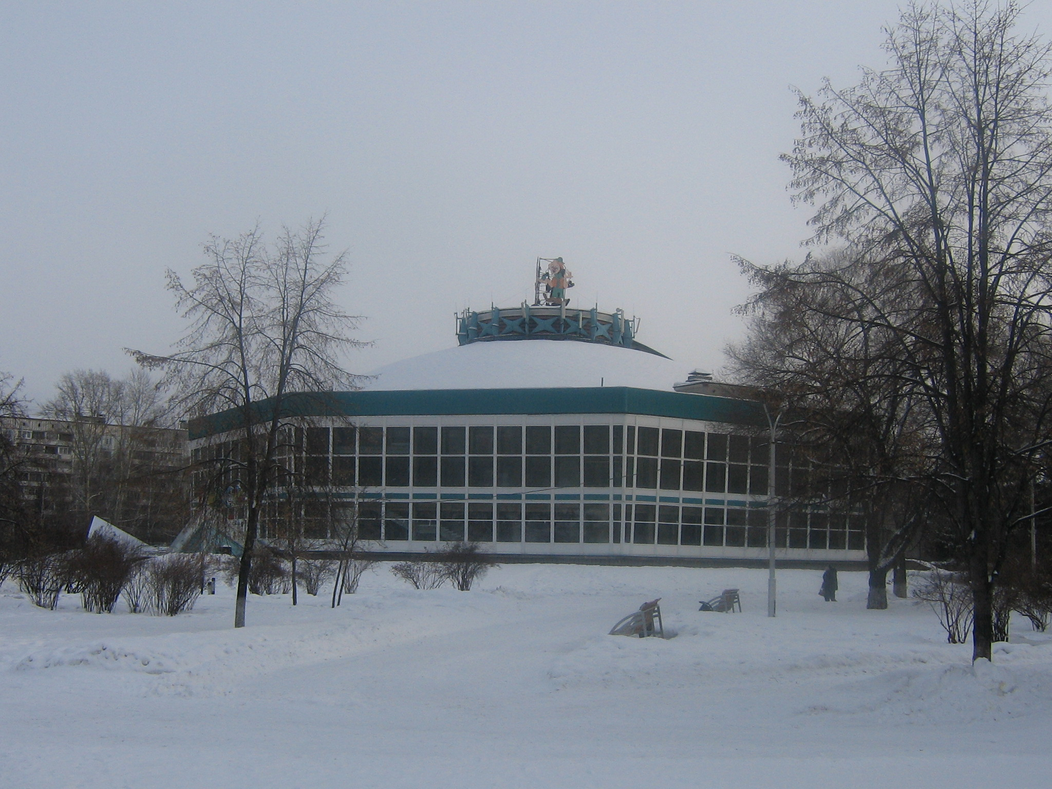 Il Circo Communale di Novokuzneck